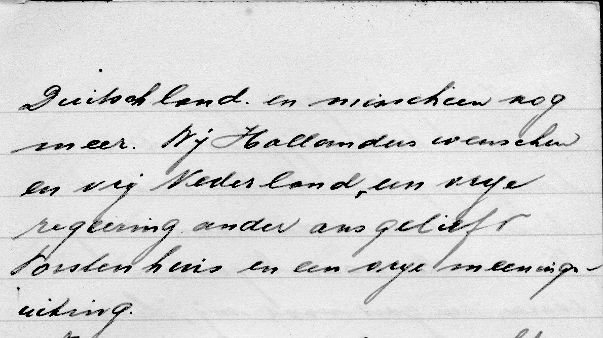 Bladzijde 4 uit het dagboekje van P.C. Kroon dat hij bijhield tijdens zijn onderduikingsperiode.